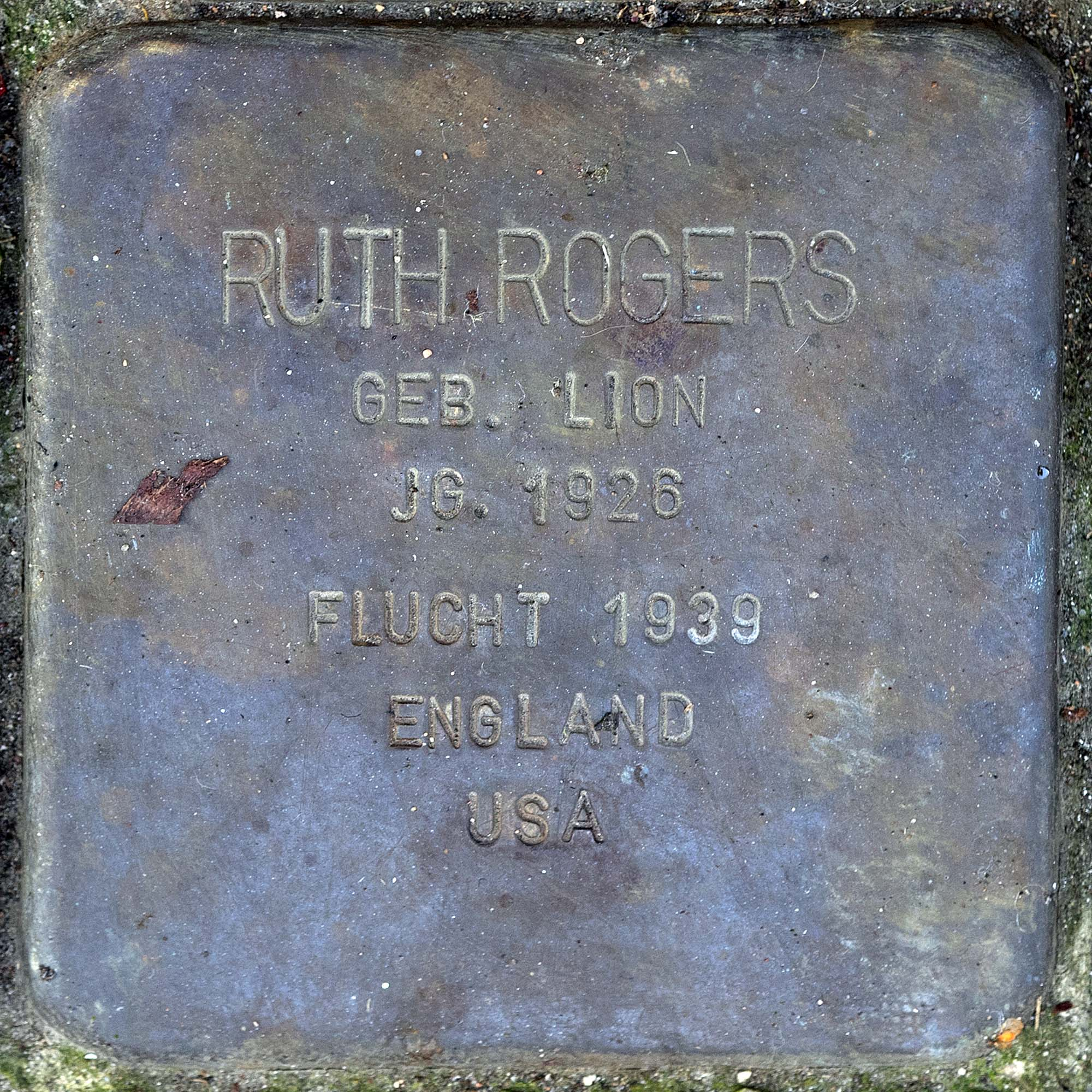 Stolperstein für Rogers Ruth